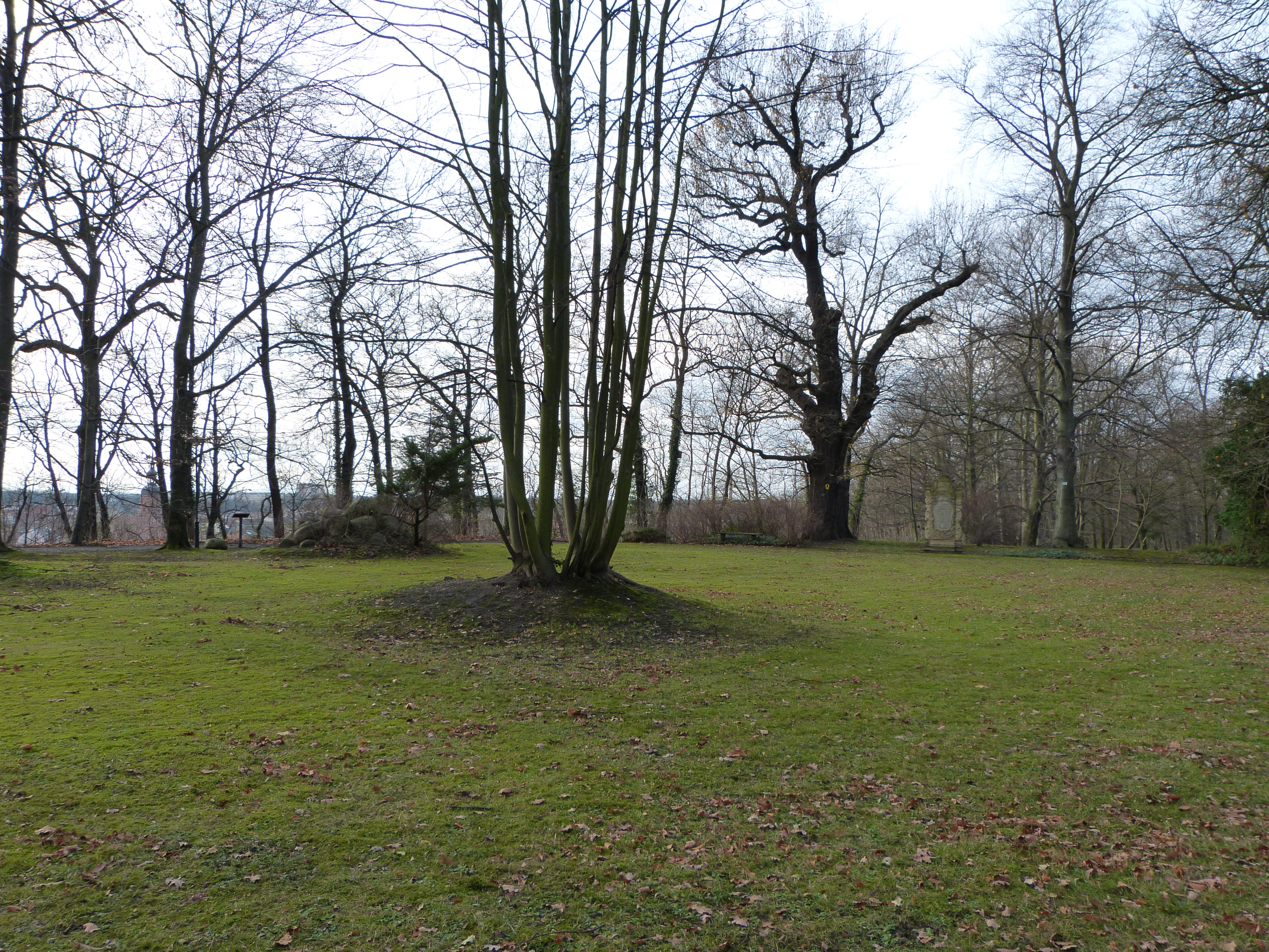 Aktuelle Ansicht des Standortes der im Juni 1970 abgerissenen St.Georg-Kapelle in Spremberg. Der Baum in der Bildmitte bildet dabei in etwa die nordöstliche hintere Ecke der ehemaligen Kapelle.